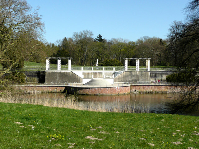 Putbus: Blick zum ehemaligen Standort des Schlosses